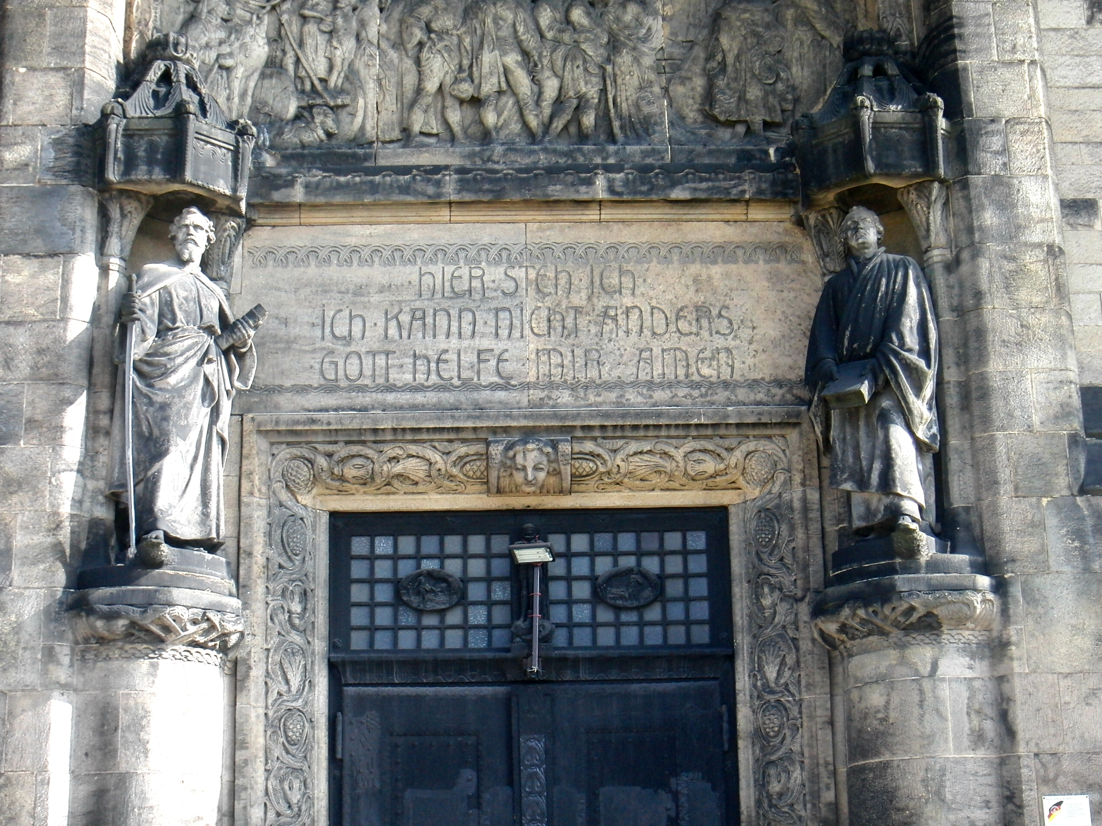 Zwickauer Lutherkirche, von den Architekten Schilling & Graebner entworfen, 1906 eingeweiht, Haupteingang mit den Figuren vom Dresdner Bildhauer Martin Engelke Apostel Paulus mit Schwert und Martin Luther mit Bibel.